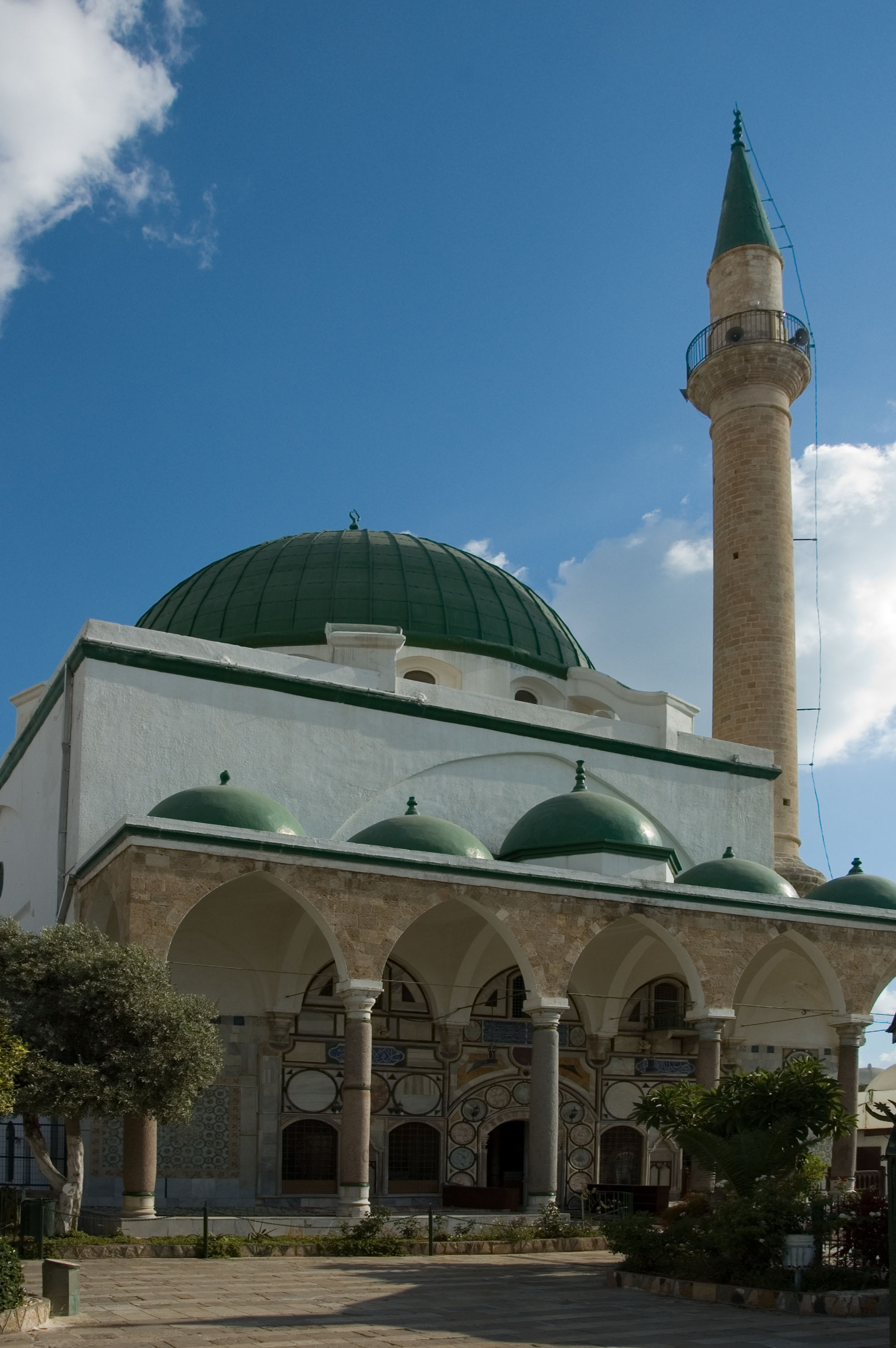 Jezzar Pasha Mosque